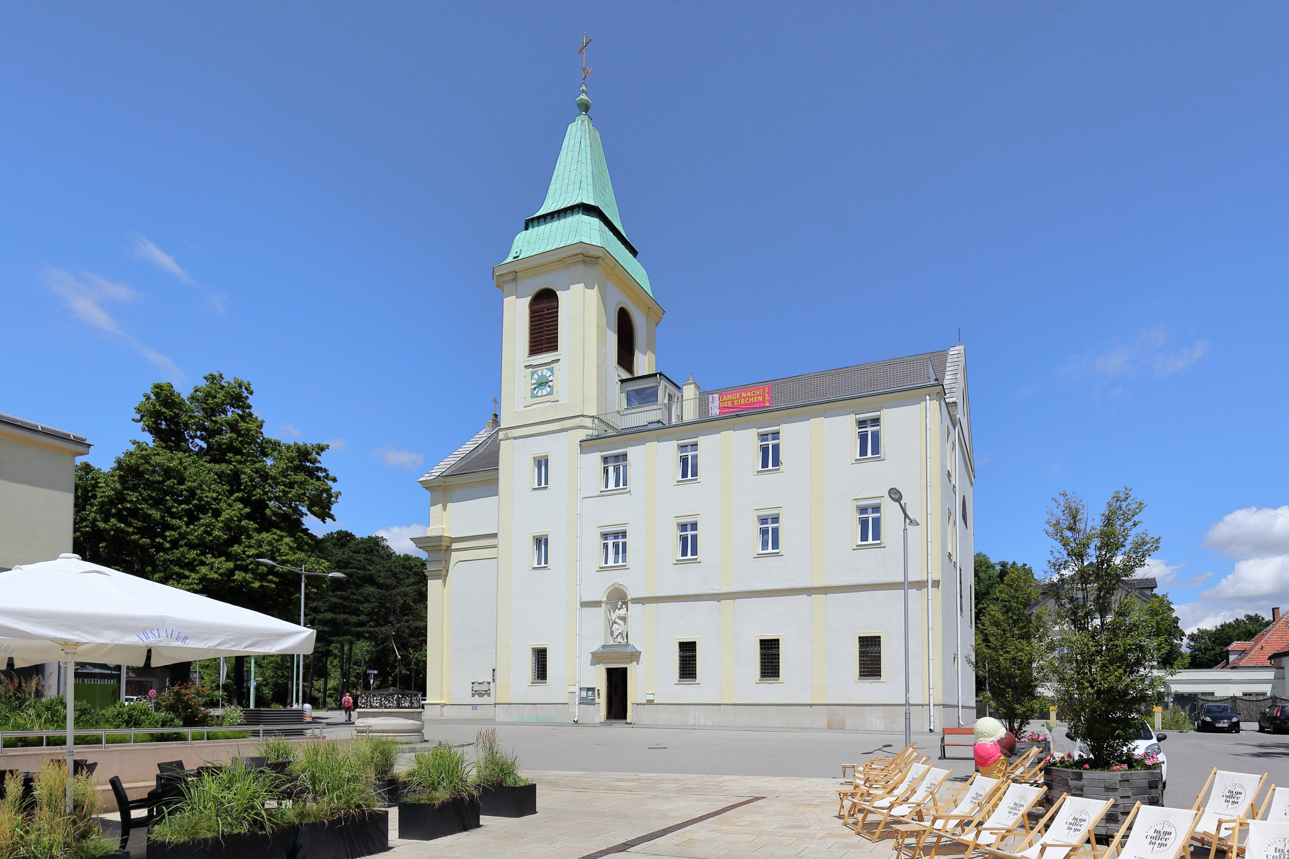 Südansicht der Kahlenbergkirche hl. Josef bzw. Josefskirche am Kahlenberg im 19. Wiener Gemeindebezirk Döbling.Der Sakralbau wurde ab 1629 im Zuge der Kamaldulenser-Klostergründung als Klosterkirche errichtet. Er verfiel mehrfach und wurde mehrfach wieder instandgesetzt sowie geweiht. Im Jahr 1906 kam die Kirche in den Besitz der polnischen Ordensgemeinschaft der „Kongregation der Auferstehung des Herrn“, die diese innen und außen mit hohem Kostenaufwand renovierte und seitdem betreut.